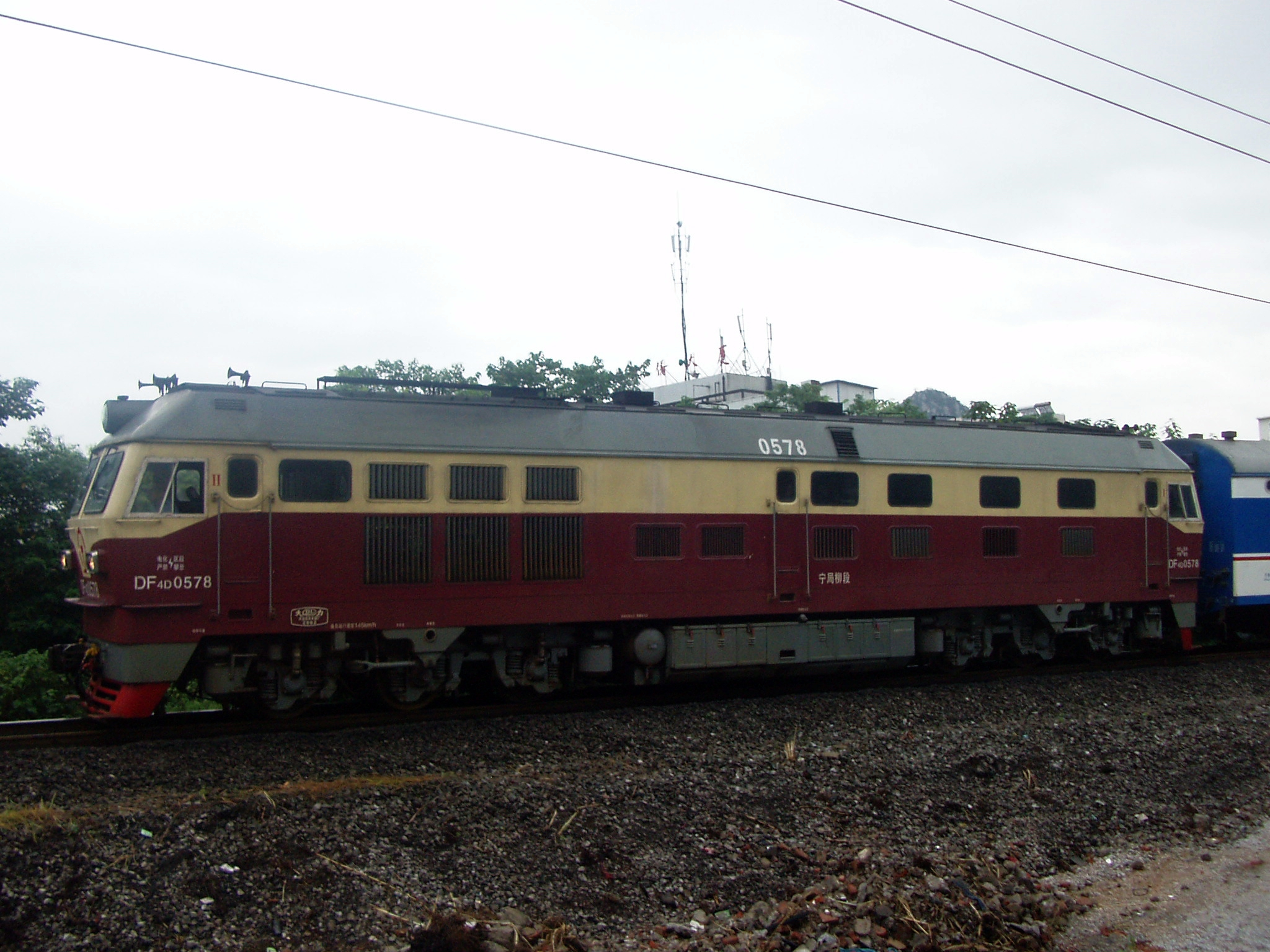 DF4D 0578牵引T6次经过桂林黑山弯道，即将进入桂林站